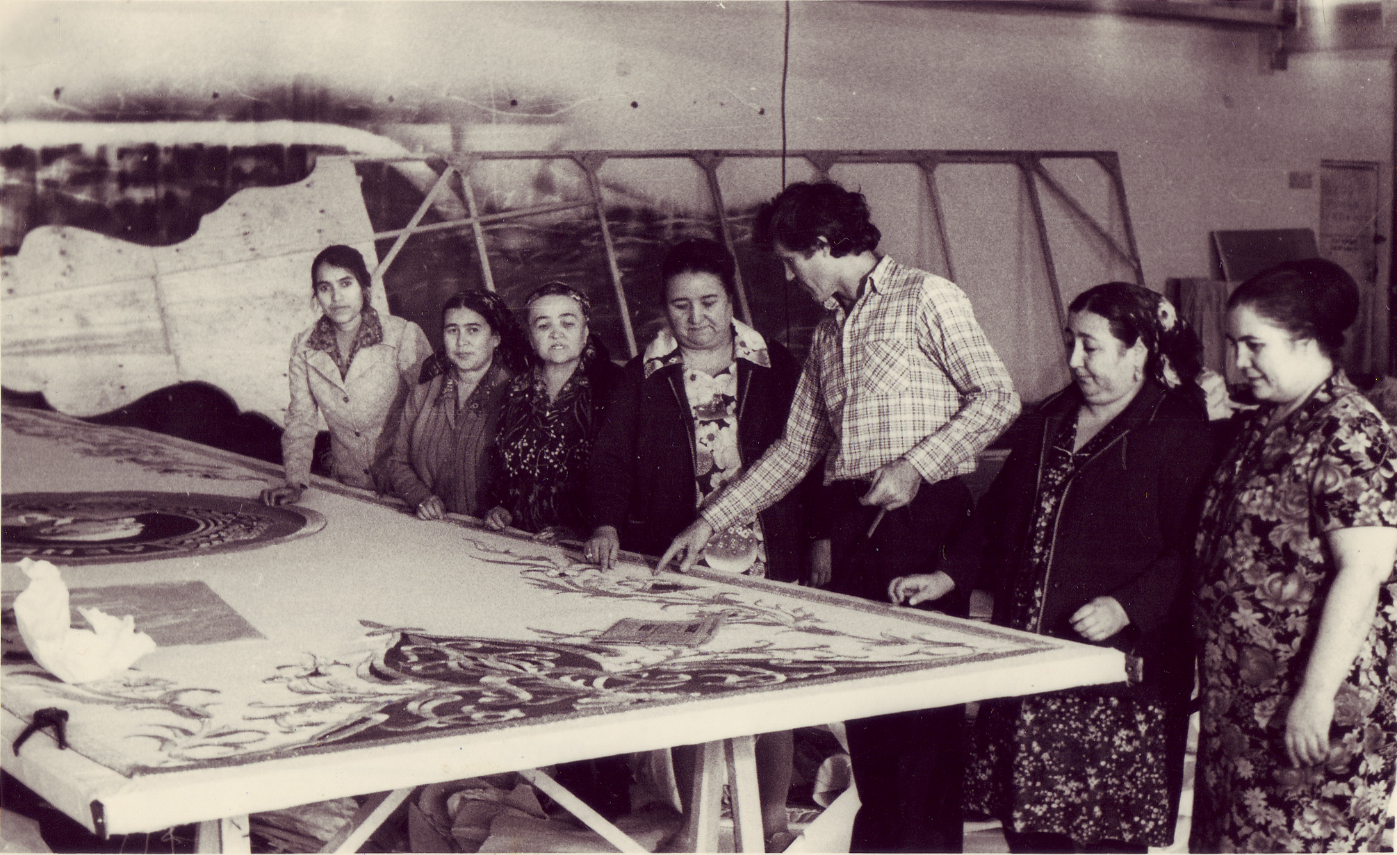 Занавес для Дворца „Дружбы народов""